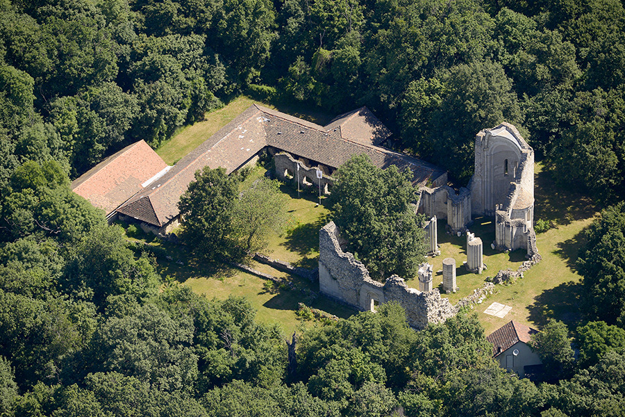 A vérteszentkereszti apátság légi fotója